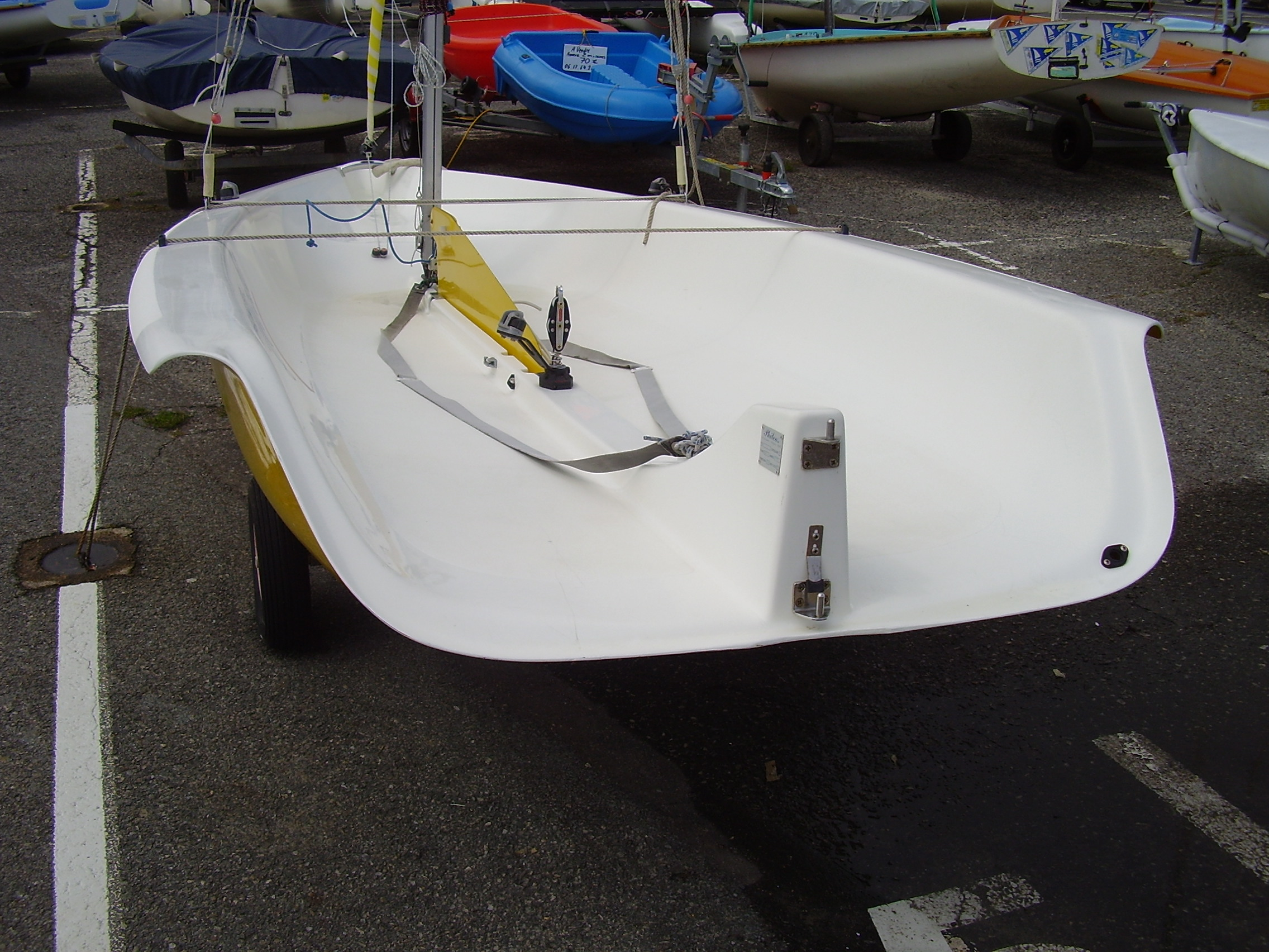 Lenzklappe